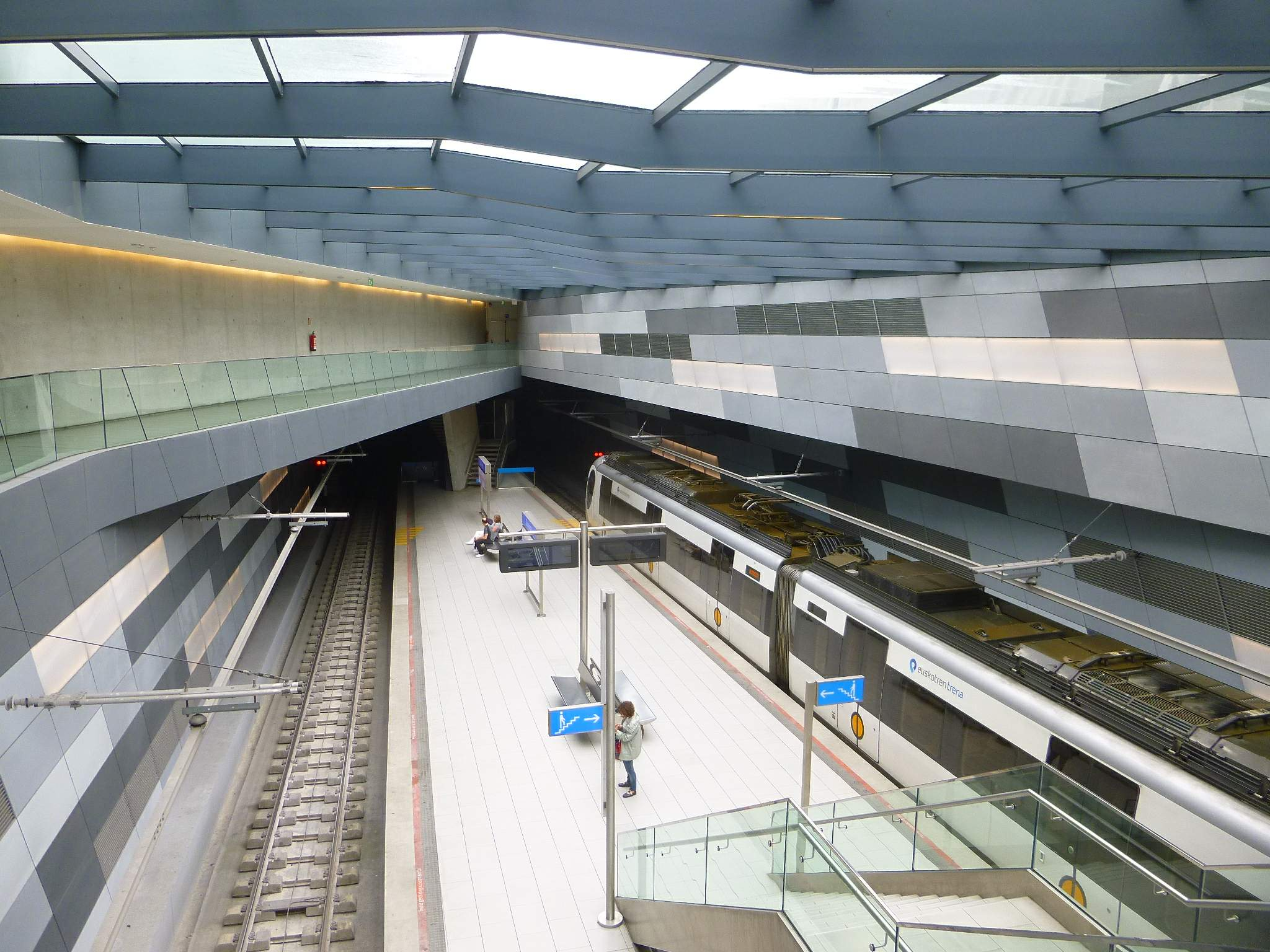 Durango - Estación de Euskotren